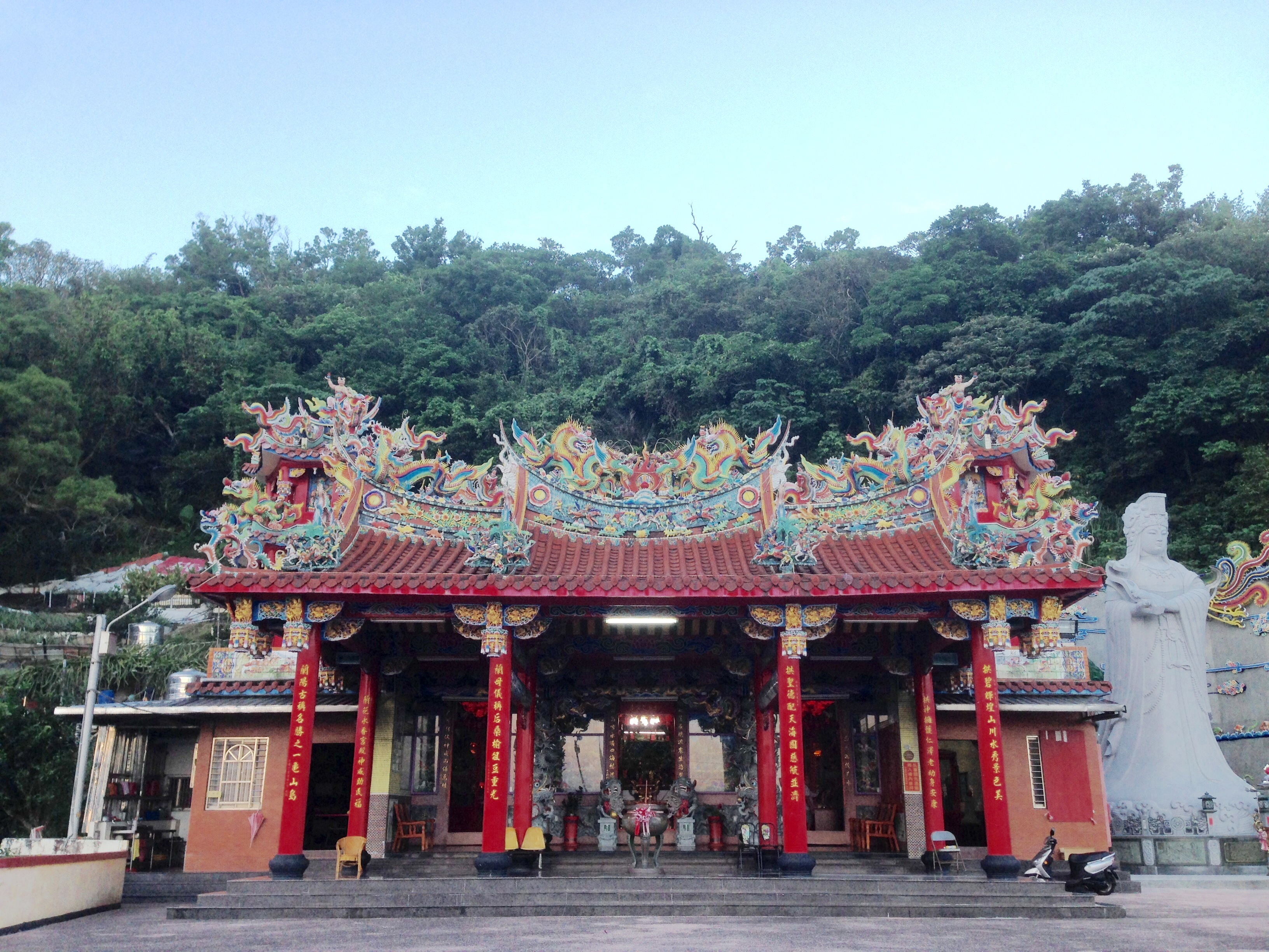 中文（台灣）: 宜蘭大溪漁港拱蘭宮